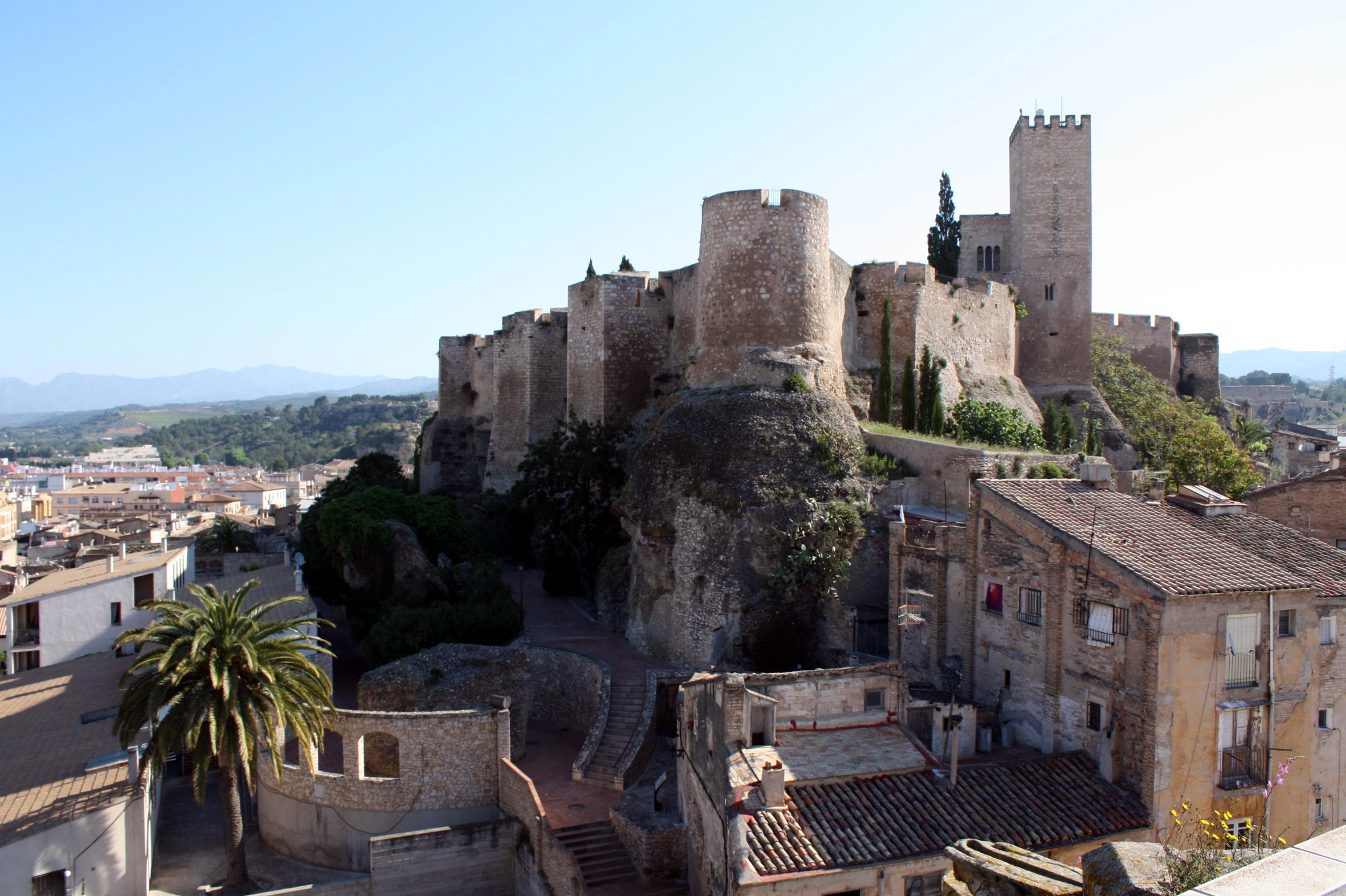 Tortosa, la Suda. El Temple en compartí la propietat amb els Montcada. (Fot. V. Cardona, 2008)